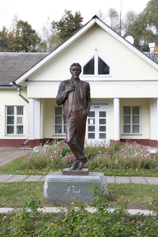 усадьба "Мелихово"